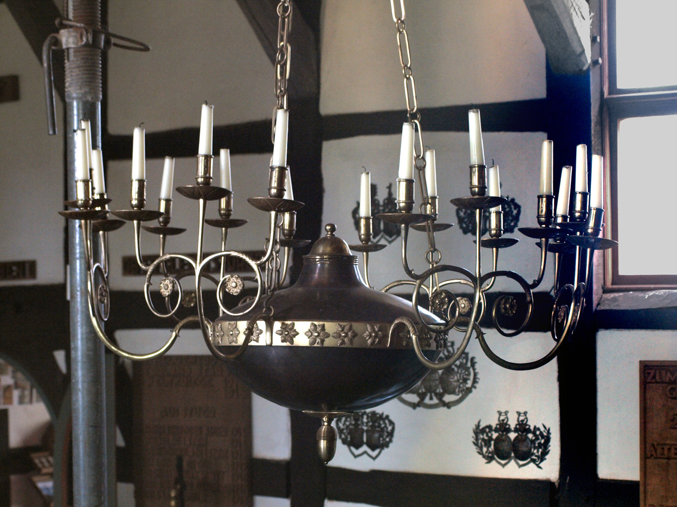 Stuer (Mecklenburg-Vorpommern), Dorfkirche, Leuchter, Foto: 2012